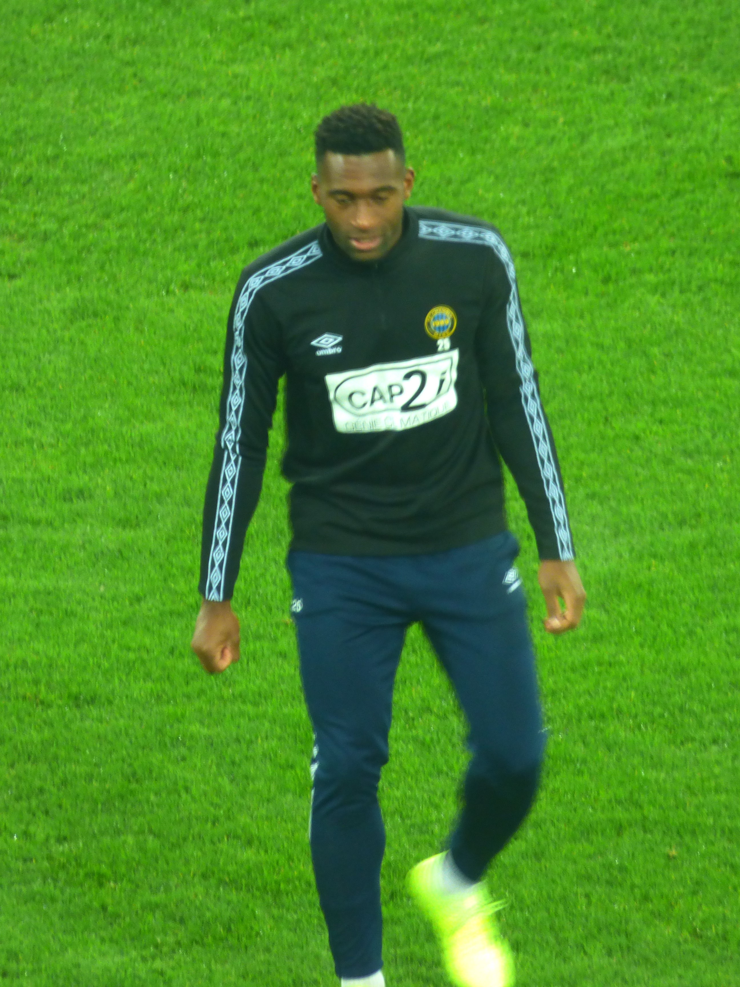 Oumar Gonzalez avant le match Lens - Chambly, comptant pour la dix-septième journée du championnat de France de football de Ligue 2 2019-2020, le 3 décembre 2019.